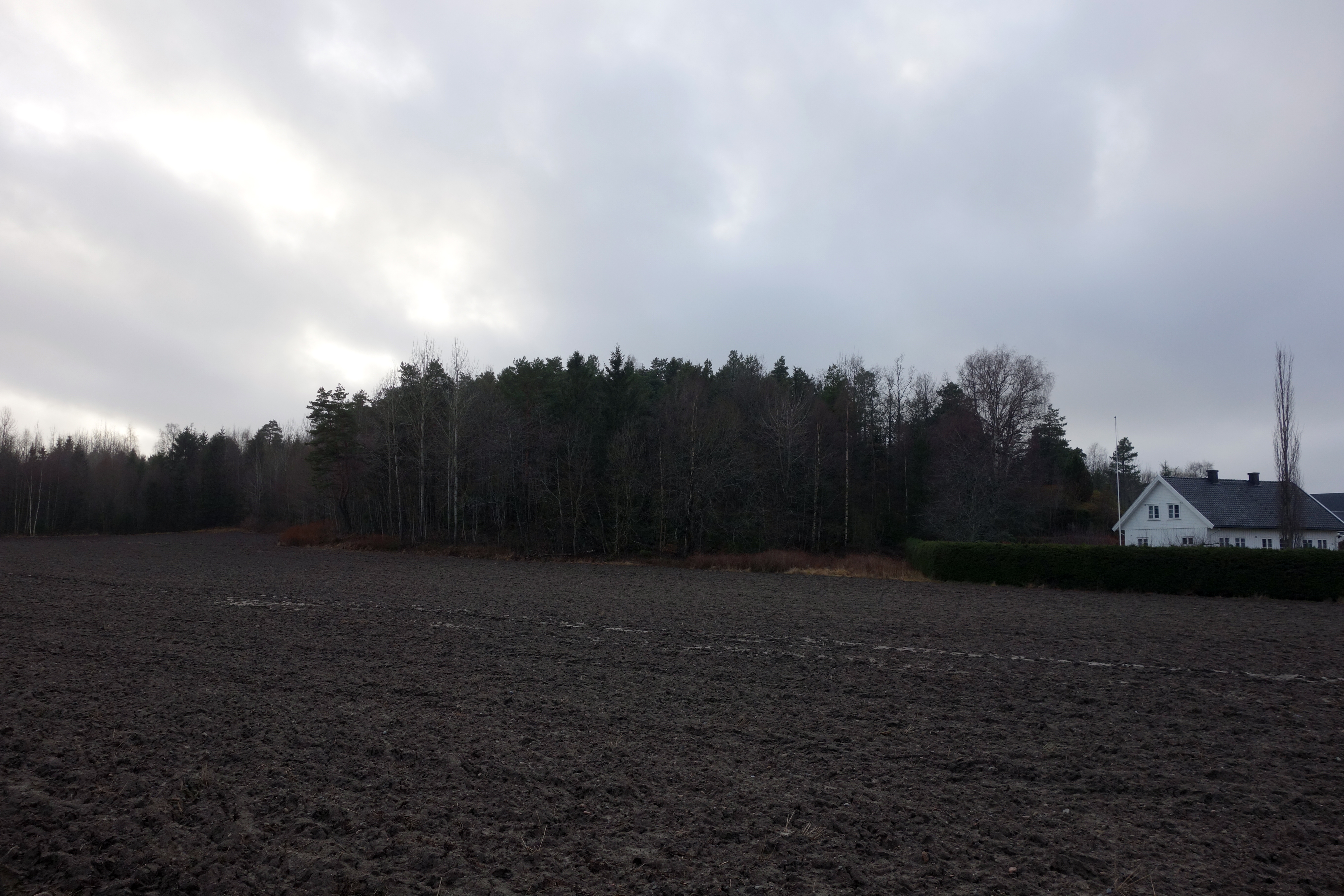 Meumsåsen på Nøtterøy i Vestfold